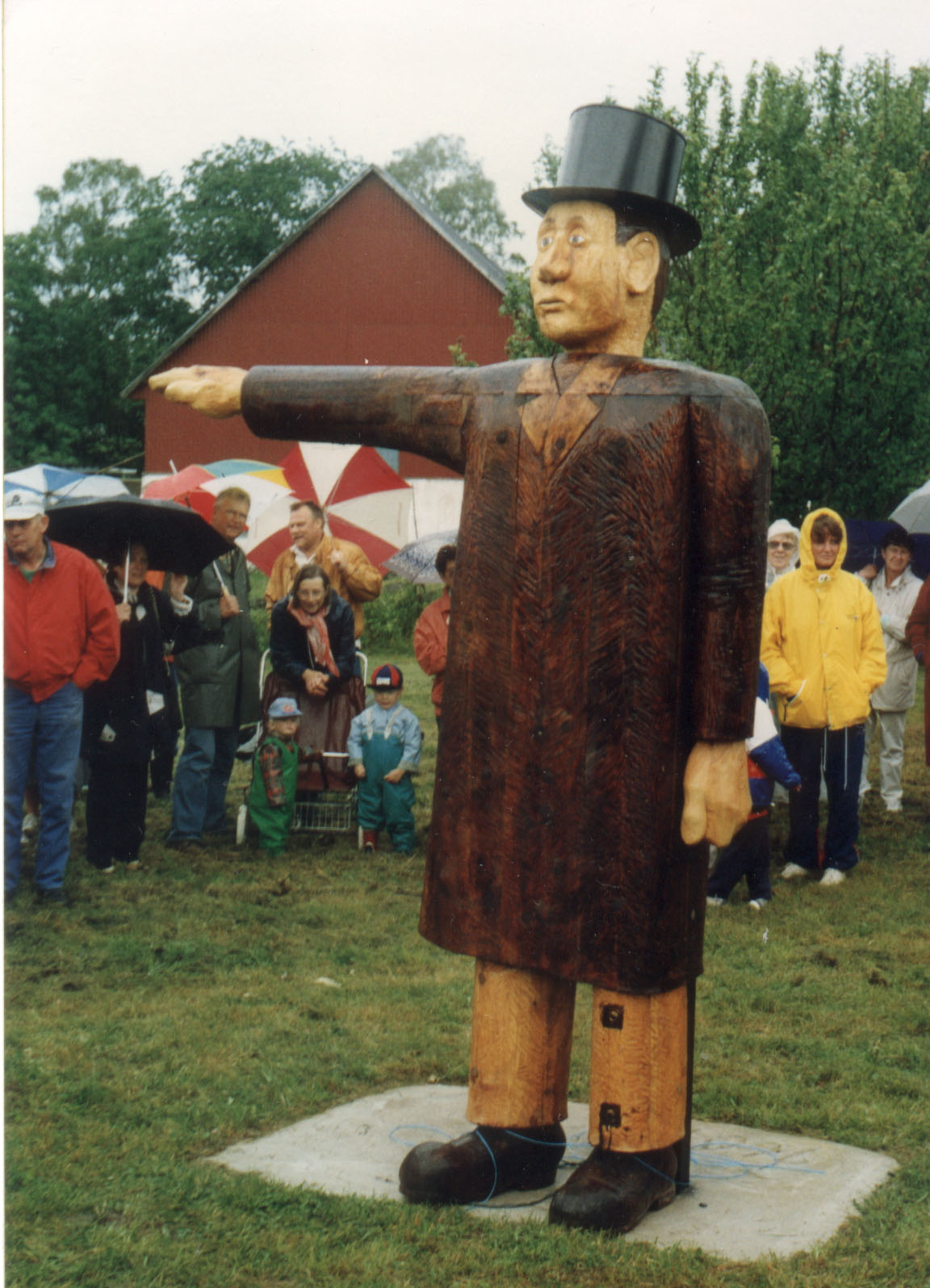 Trästaty av Jätten Edman